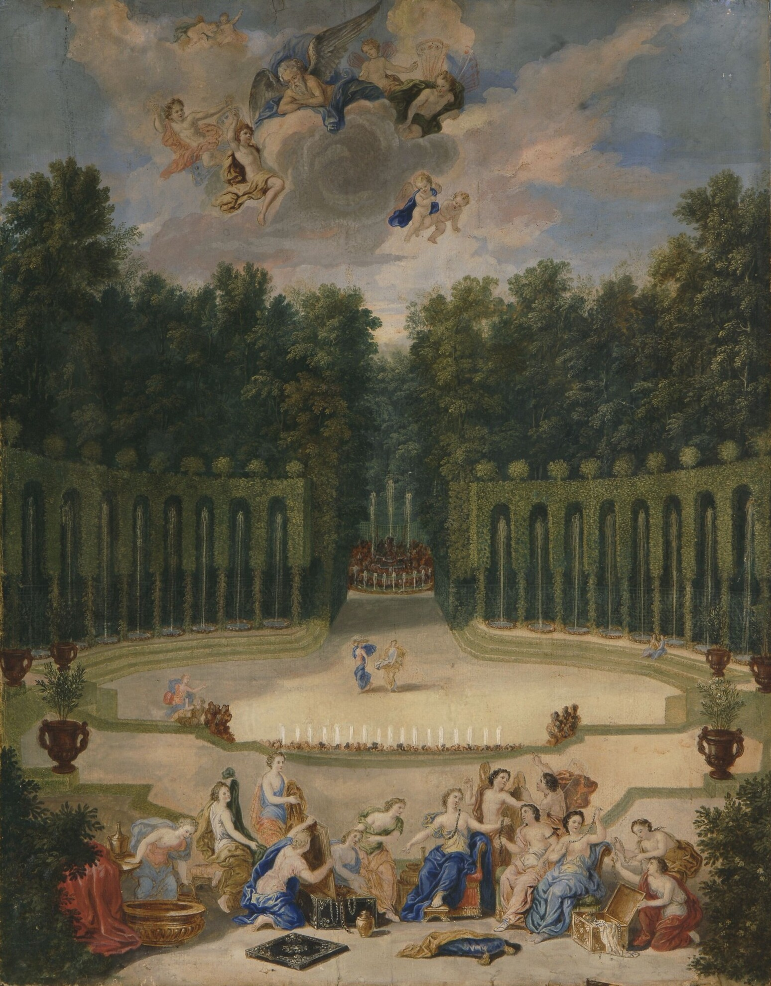 Vue de l'amphithéâtre du Théâtre d'eau avec Vénus parée par les heures en présence d'Ouranos. Dimensions : 46,8 x 37,1 cm. Cadre: 54,2 x 44,5 x 3 cm. Matière et technique : Gouache sur tracé à la plume et encre de chine.